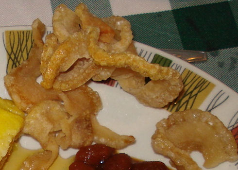 oreilles de crisse ou grillades de lard plat québecois